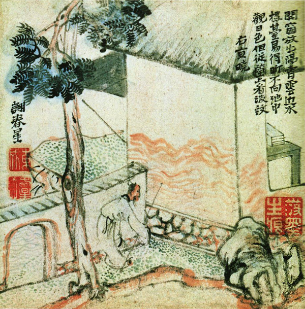 Sengyo(Jugijo) 宜暁（国宝 十便十宜帖の一枚）